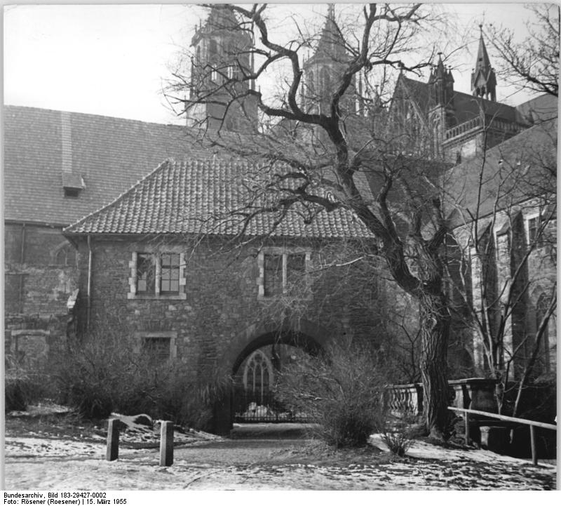 Zentralbild-Rösener Zi-Wjt 15.3.55 1 000 Jahre Magdeburger Dom Der Magdeburger Dom wird 1955 seine Tausendjahrfeier begehen. Die Schäden des Bombenkrieges werden zur Zeit durch umfangreiche Bauarbeiten beseitigt. UBz, Am Remtergang - vom Schleinufer aus gesehen.